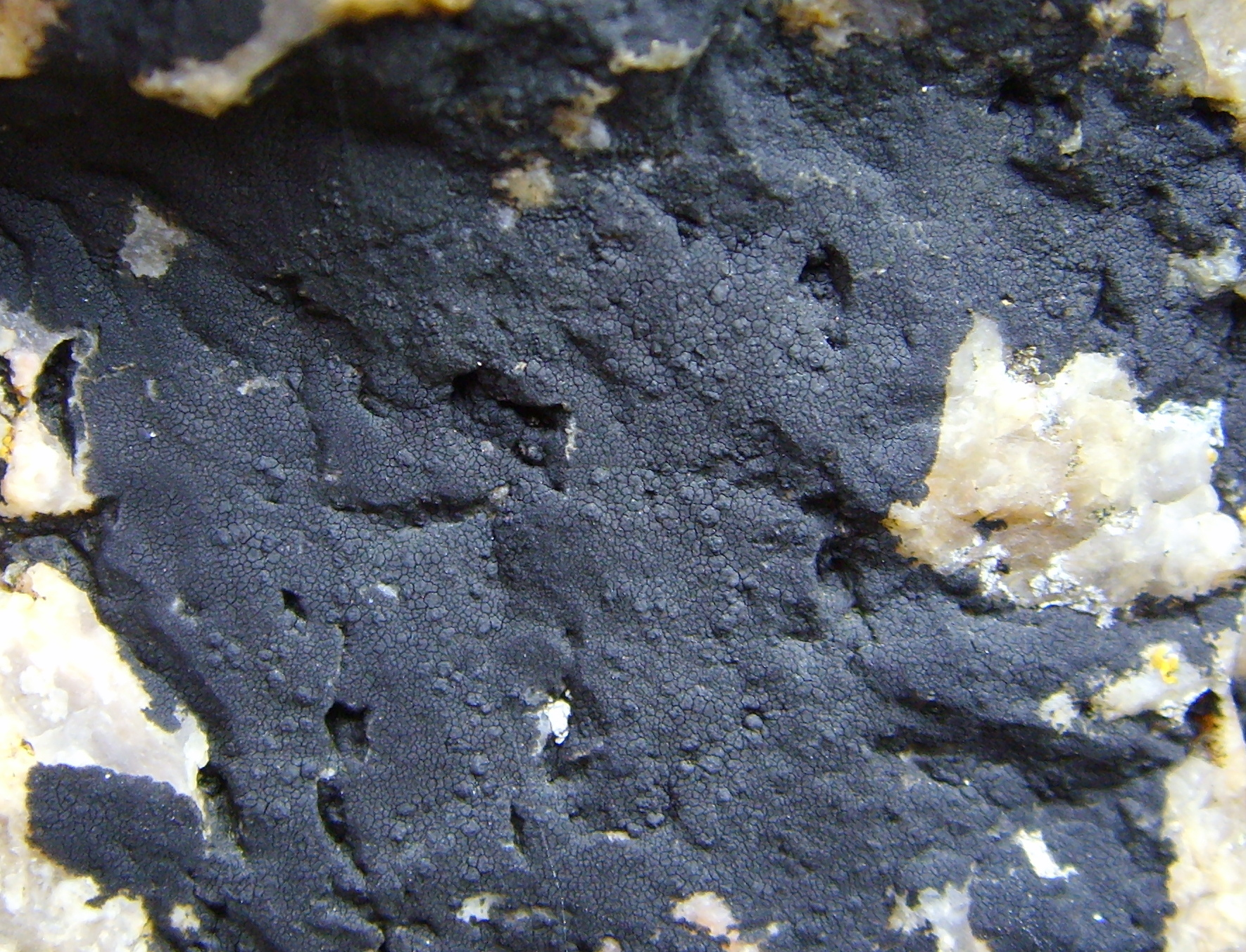 Verrucaria maura, Kergulan, Goulien, Finistère, Bretagne (France)